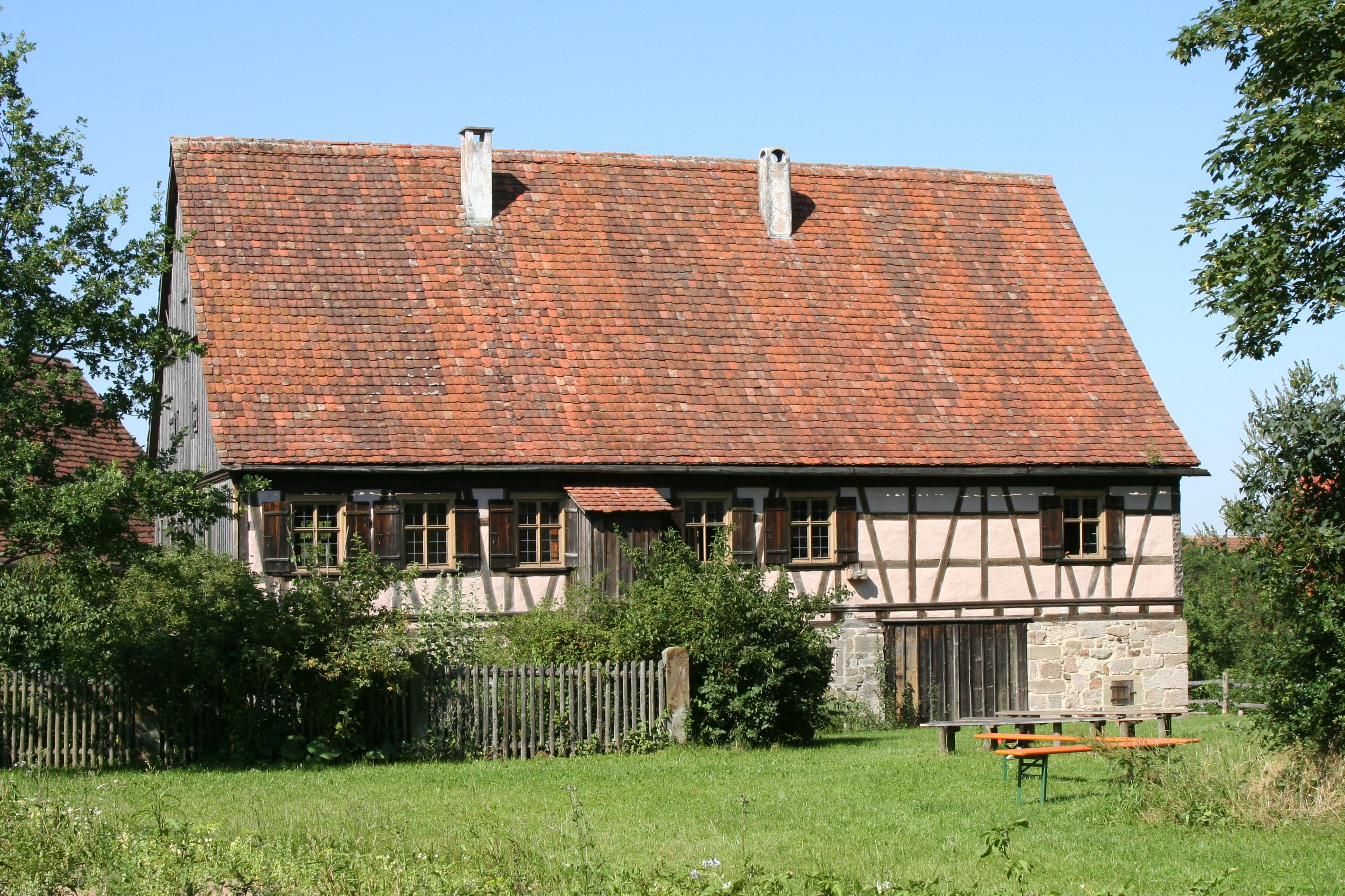 Steigengasthaus Rose aus Michelfeld im Freilandmuseum Wackershofen. Rückseite